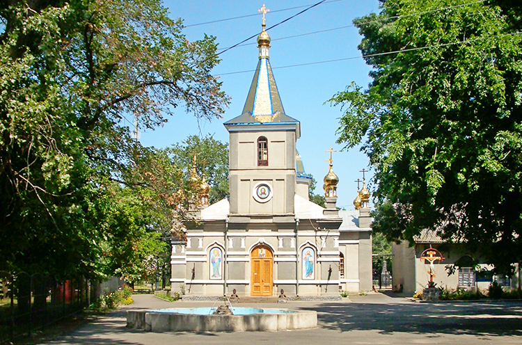 Церковь Николая Чудотворца в городе Раздельная была основана в 1901 году. Поскольку, Раздельная представляла собой небольшой поселок, церковь строили небольшую, как для села. Зато вышла она очень изящной и гармоничной. Фонды на строительство выделяла железная дорога. Николай Чудотворец - покровитель путешественников. Разрешение же в начале ХХ века становится железнодорожной станцией 1 -й категории, в связи с этим имя церкви дано не случайно. Как впрочем, и местоположение: у вокзала, что позволяет всегда быть в центре общественной жизни. При церкви была и приходская школа. Настоятелем церкви в это время был Романович Ипполит Николаевич, который был предоставлен, вниманием самого императора Николая II. В 1904 году Николай II с женой Александрой Федоровной прибыл в Раздельную и посетил Свято-Николаевскую церковь, где наградил именными золотыми часами священника отца Ипполита, за усердие. В 1911 году император Николай II во второй раз посетил Раздельнянскую церковь, но уже вместе со своим сыном, наследником престола царевичем Алексеем. В начале 20- х годов настоятель церкви отец Ипполит умирает от тифа в возрасте 44 лет. Могила отца Ипполита находится в церковном дворе. После его смерти церковь была закрыта на долгие годы. Во время оккупации церковь открыли, однако прежнего внешнего величия она лишилась. Действовала она в начале 50- годов и вновь была закрыта, до 90- годов ХХ века. И только в 1990 году, церковь вернули настоящим хозяевам. В 5 октября 1997 года церковь была полностью восстановлена и освящена Агафангелом, митрополитом Одесским и Измаильским.